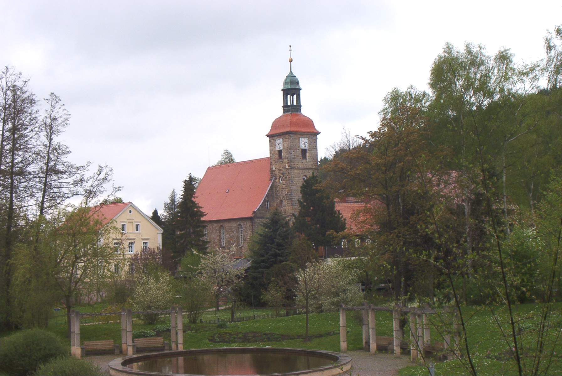 Kirche im Luftkurort Jonsdorf